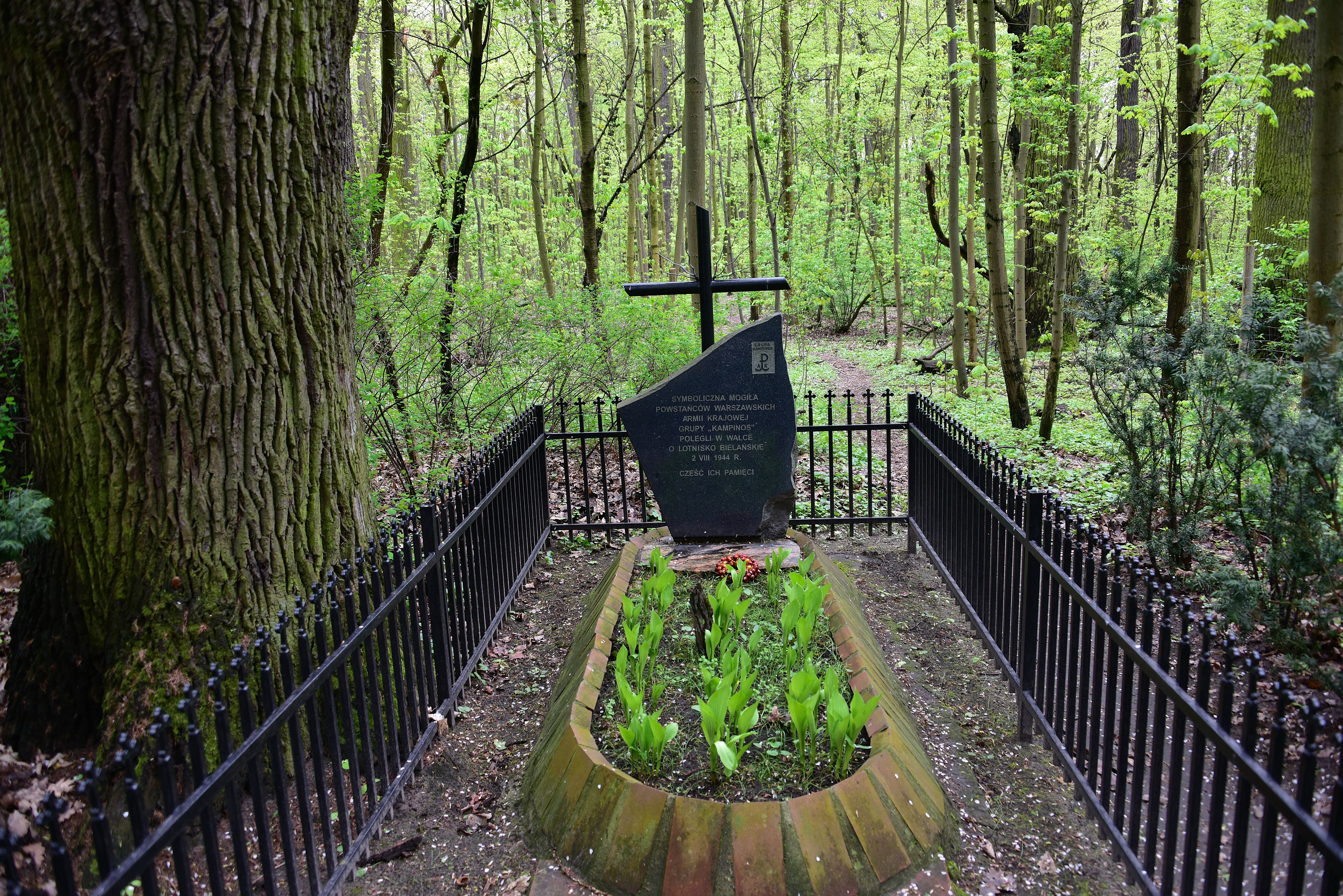 Symboliczna mogiła żołnierzy Grupy AK „Kampinos” poległych 1-2 sierpnia 1944 w natarciu na lotnisko bielańskie w zespole "Dęby Młocińskie"